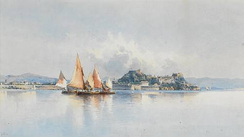 Κέρκυρα υδατογραφία 39.5 x 70 εκ.